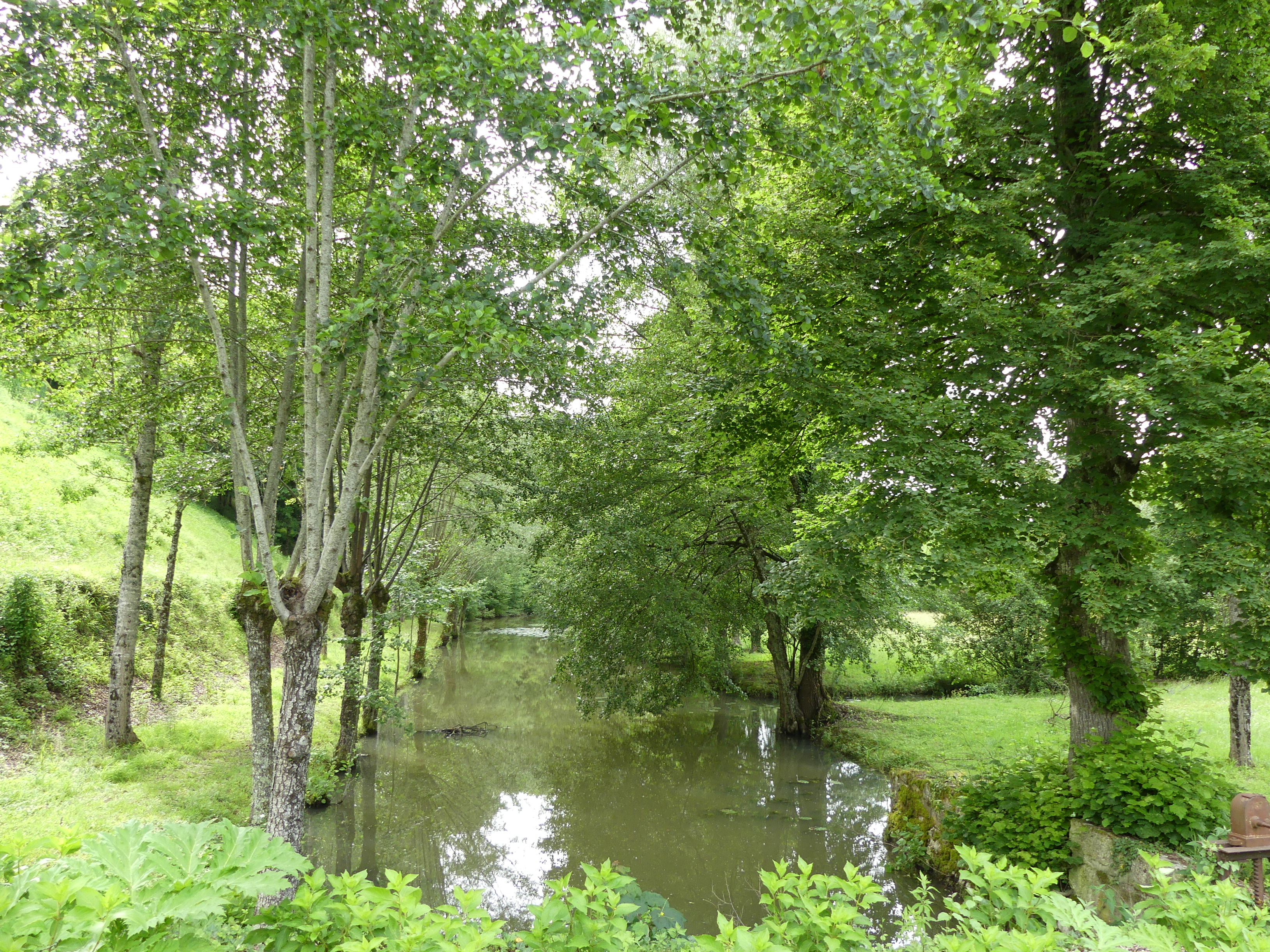 Le ruisseau de Mesplier en contrebas du château, Château-l'Évêque, Dordogne, France. Vue prise en direction de l'amont.